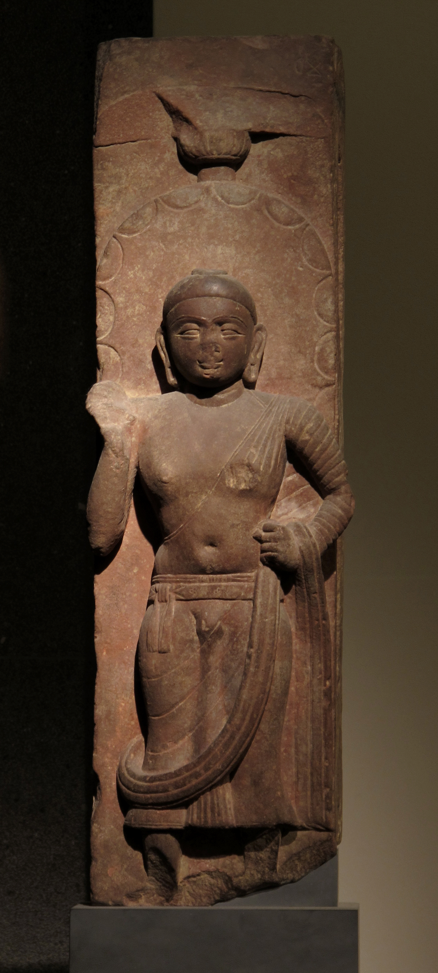 Buddha. Uttar Pradesh. Région de Mathura, époque kusana, fin du Ier début du IIe siècle. Grès rouge. Musée national des arts asiatiques - Guimet. MG 17249